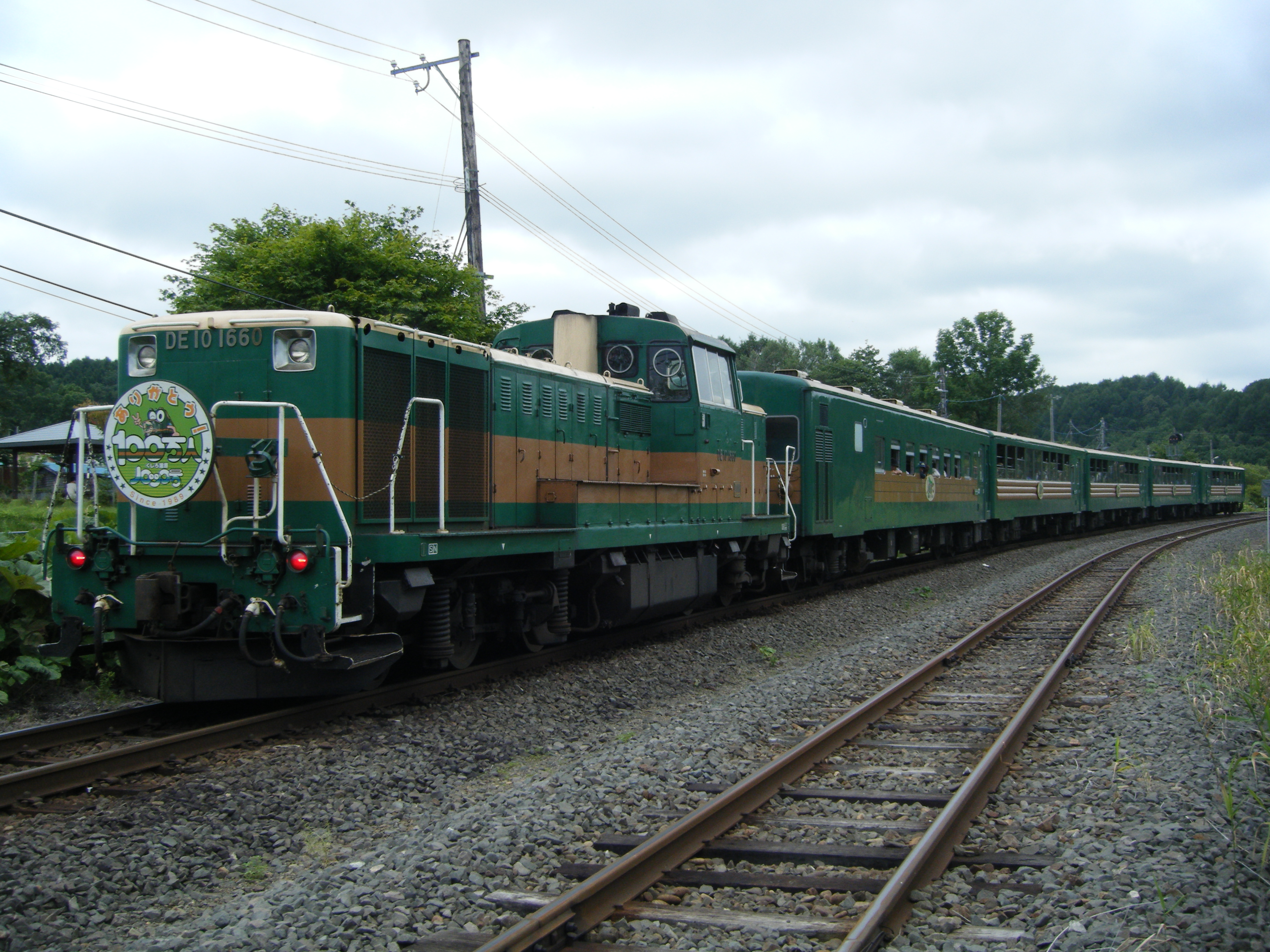 くしろ湿原ノロッコ号 塘路駅にて撮影（敷地外より撮影）